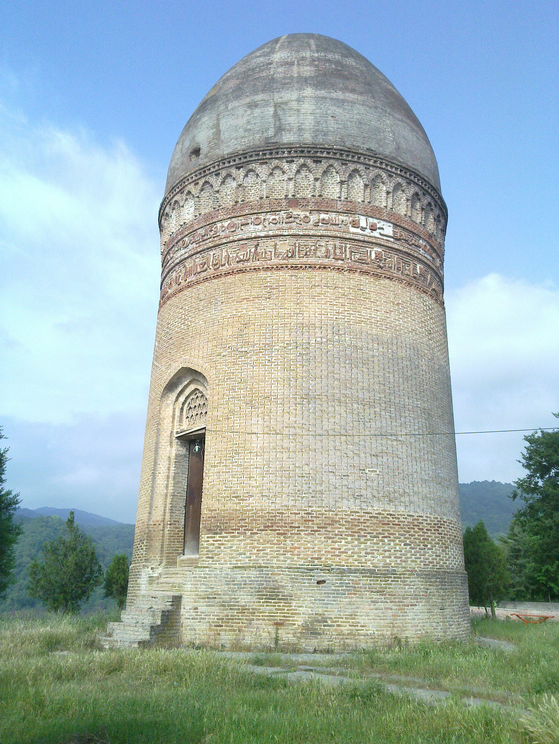 نمای بیرونی